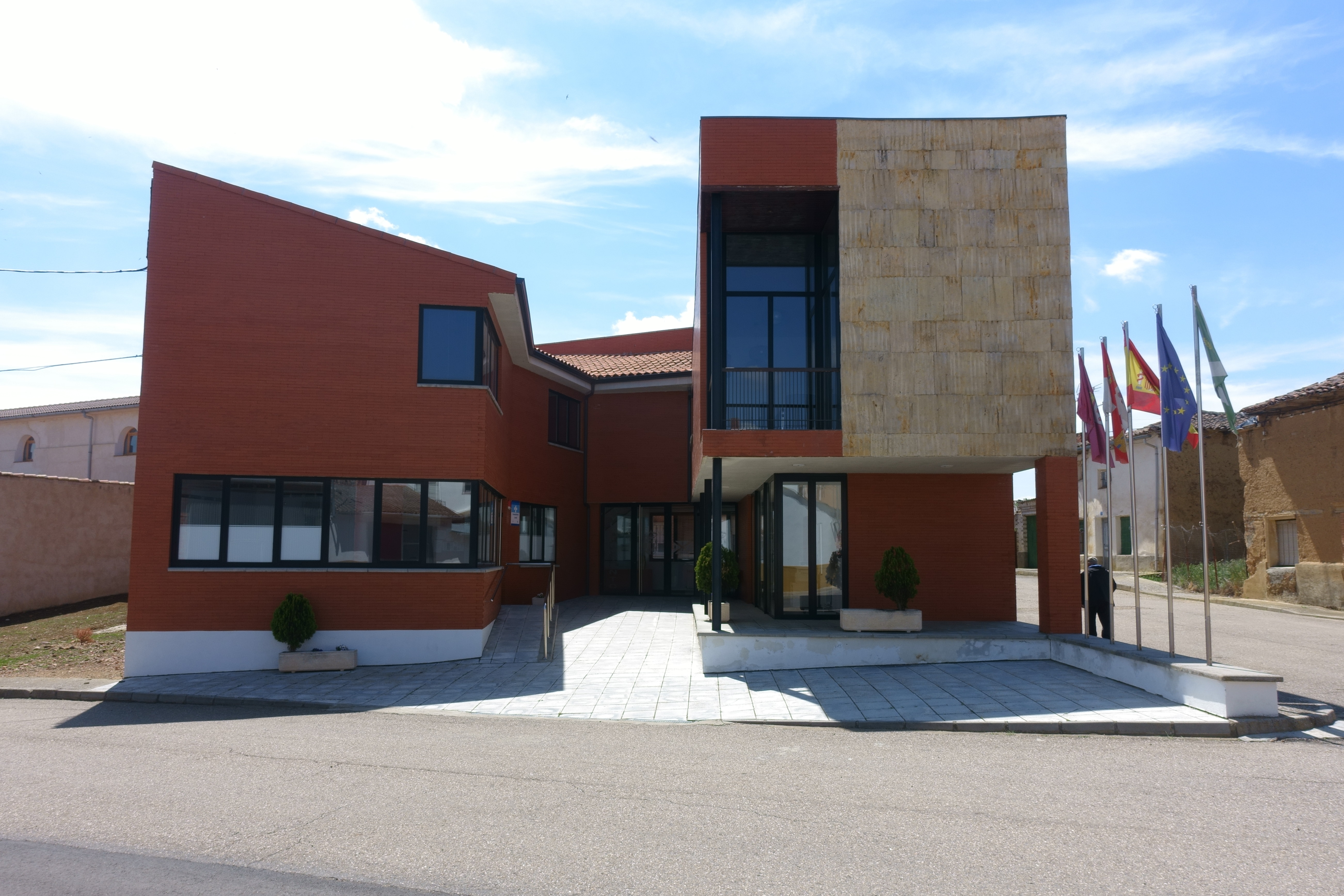 Casa consistorial de Joarilla de las Matas (León, España).